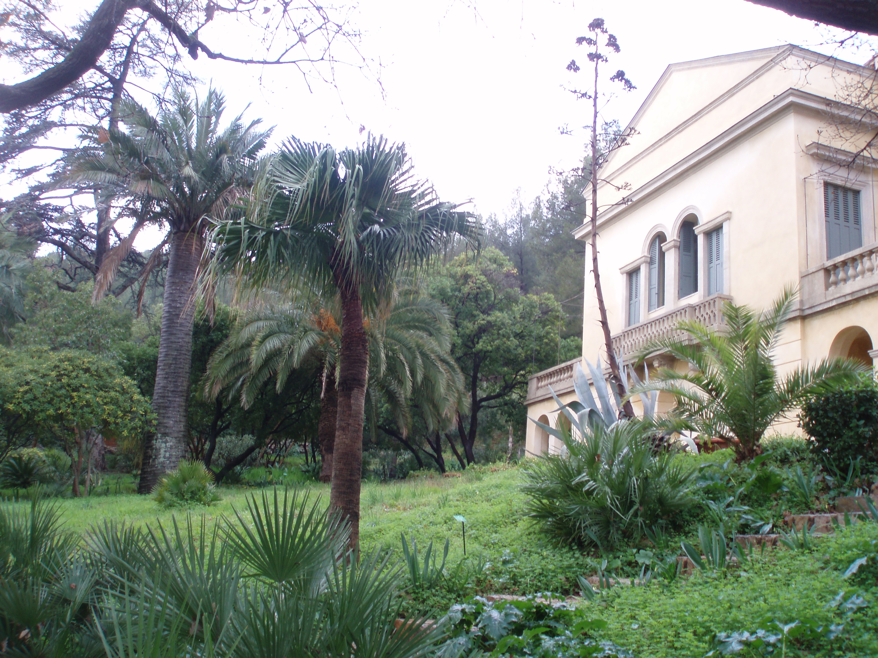 Le Plantier de Costebelle en 2010